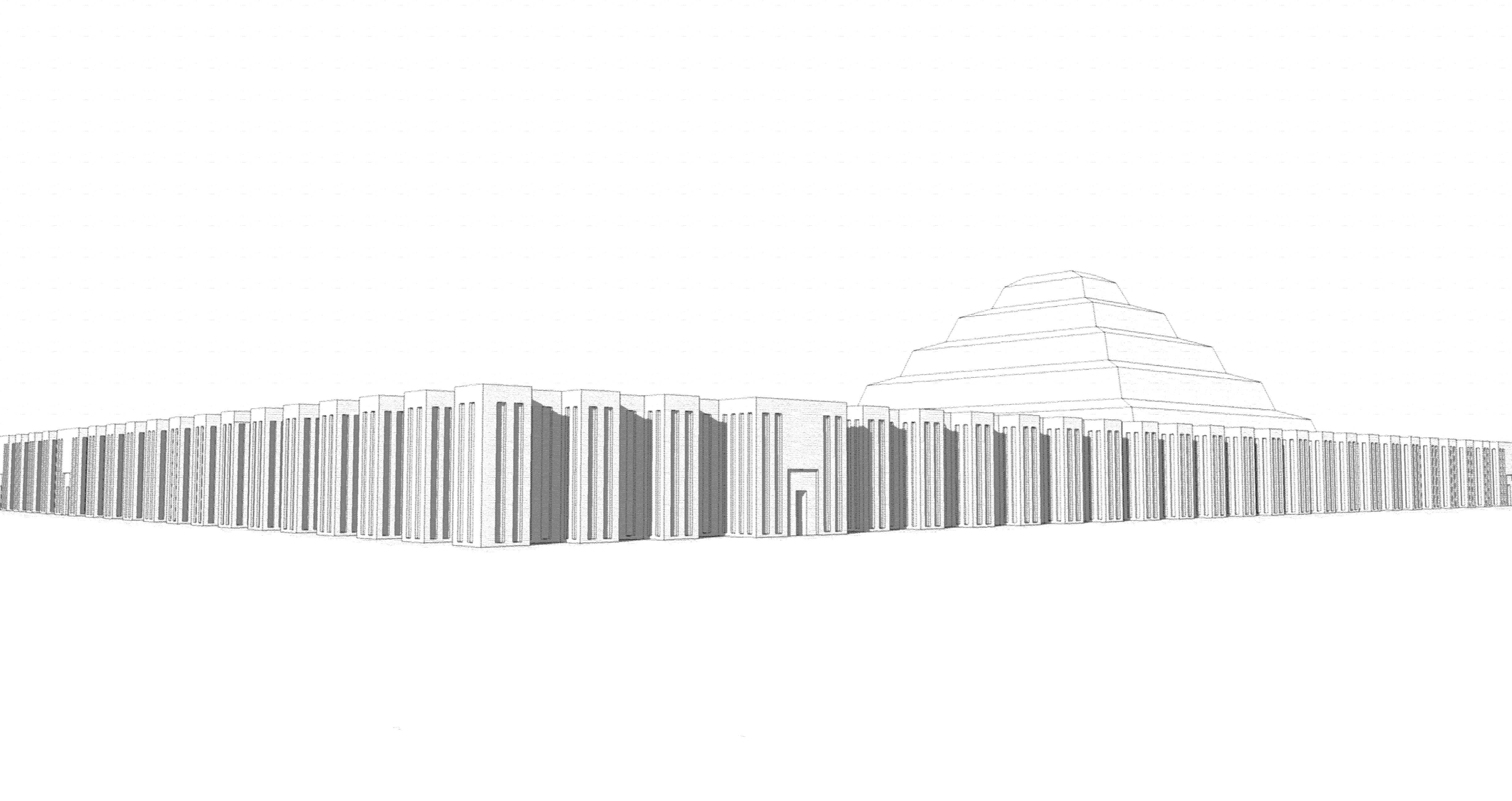 Vue de l'enceinte du complexe funéraire de Djoser à Saqqarah en Egypte